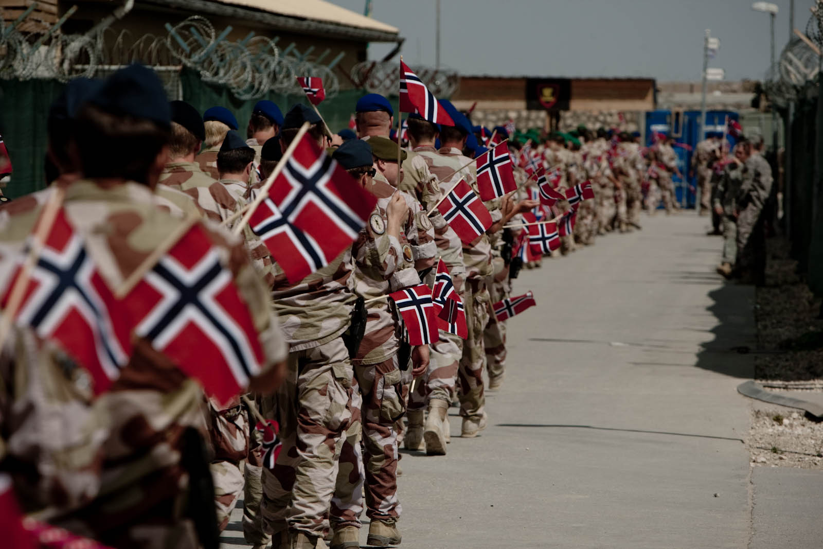 Norske soldater feirer 17. mai i Meymaneh, Afghanistan